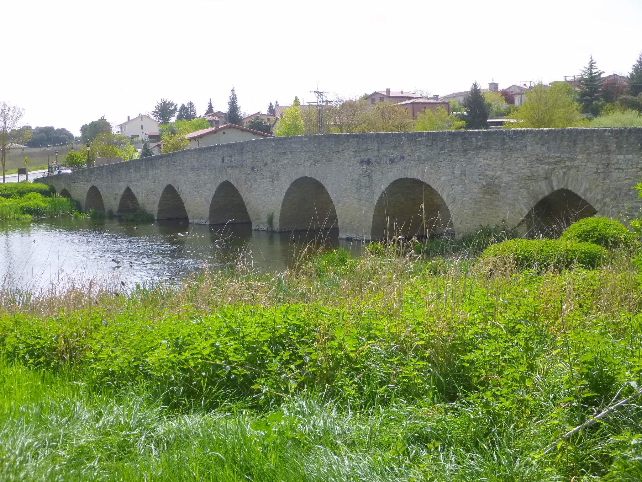 Puente de Víllodas (Álava)